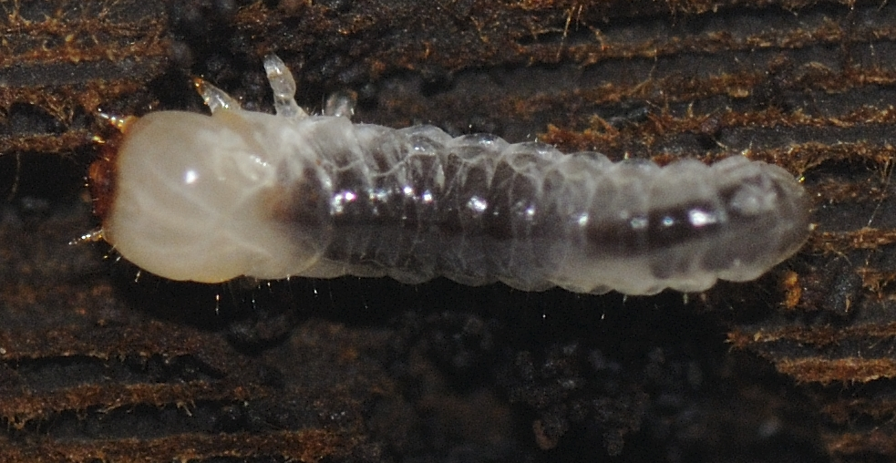 In Brandenburg